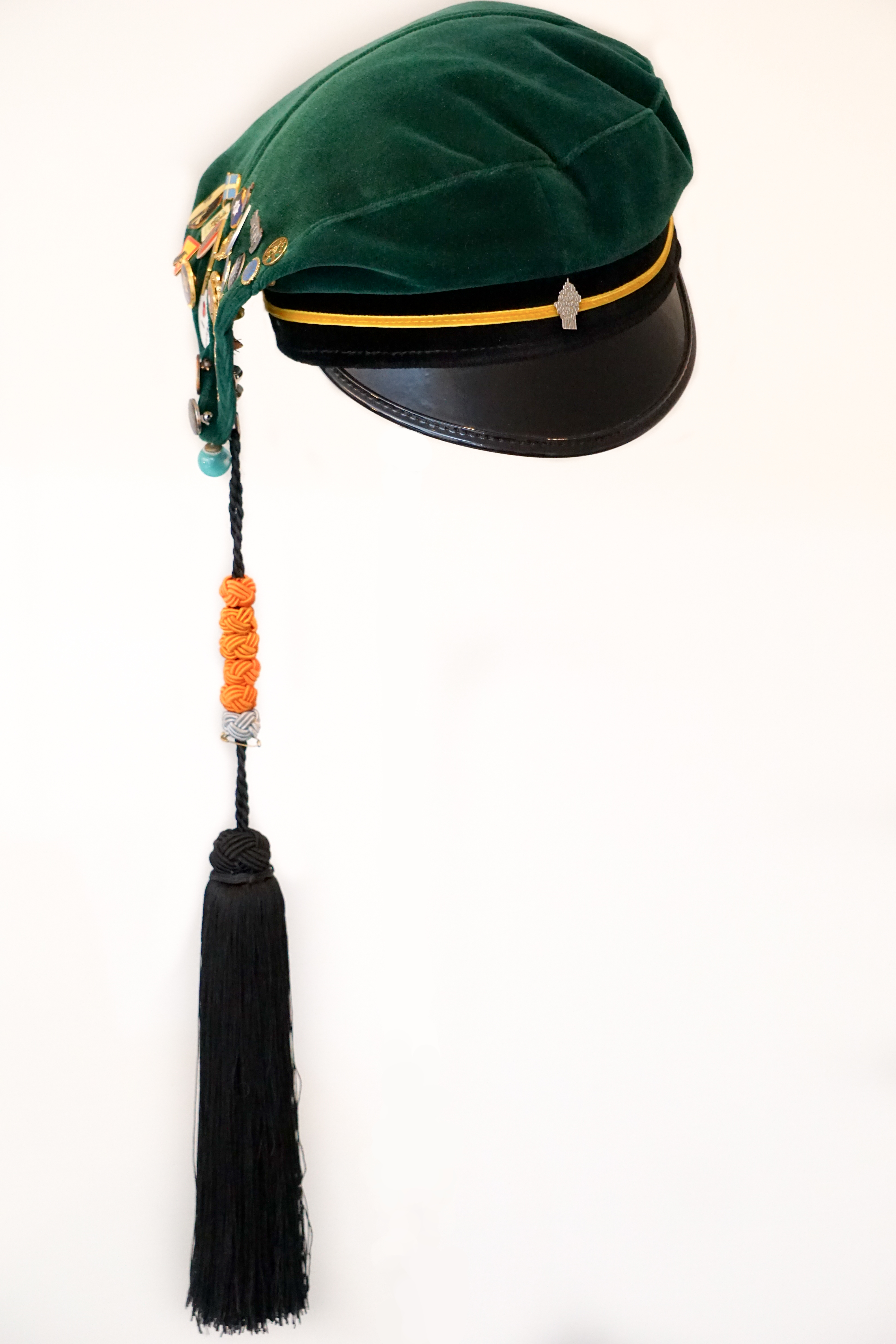 En teknologmössa från Umeå Universitet. Studenten har enligt spegaternas färg att tyda studerat ett Tekniskt-naturvetenskapligt basår följt av 5 år på Teknisk Fysik och dennes relationsstatus är enligt spegaternas vertikala position singel. (Botten: upptagen, mitten: singel, topp: desperat)